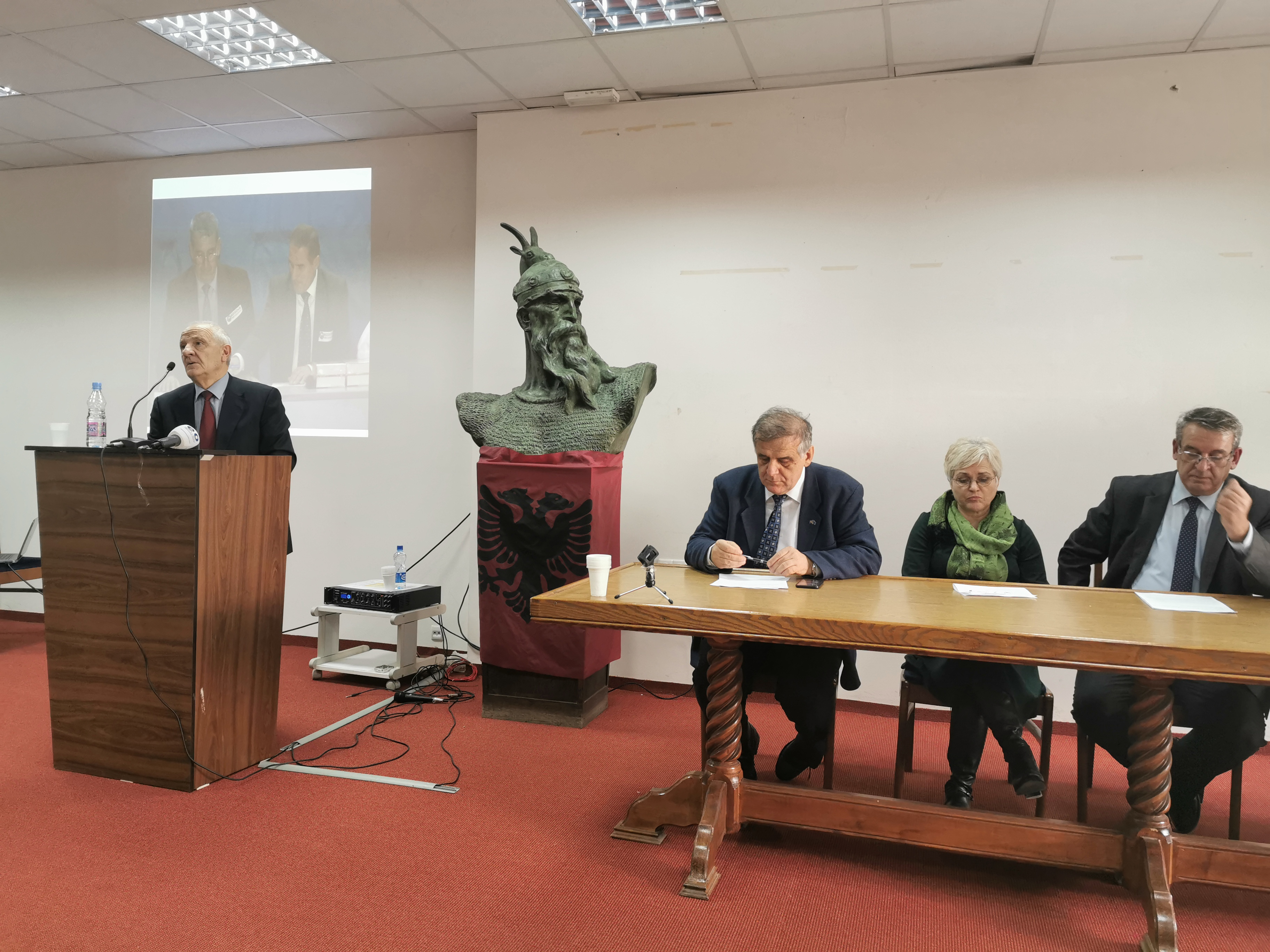 Prof Dr, Fatmir Sejdiu, përshëndet Kuvendin Zgjedhor të shoqatës " Kosova për Sanxhakun"